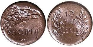 Eshte lek Shqiptar